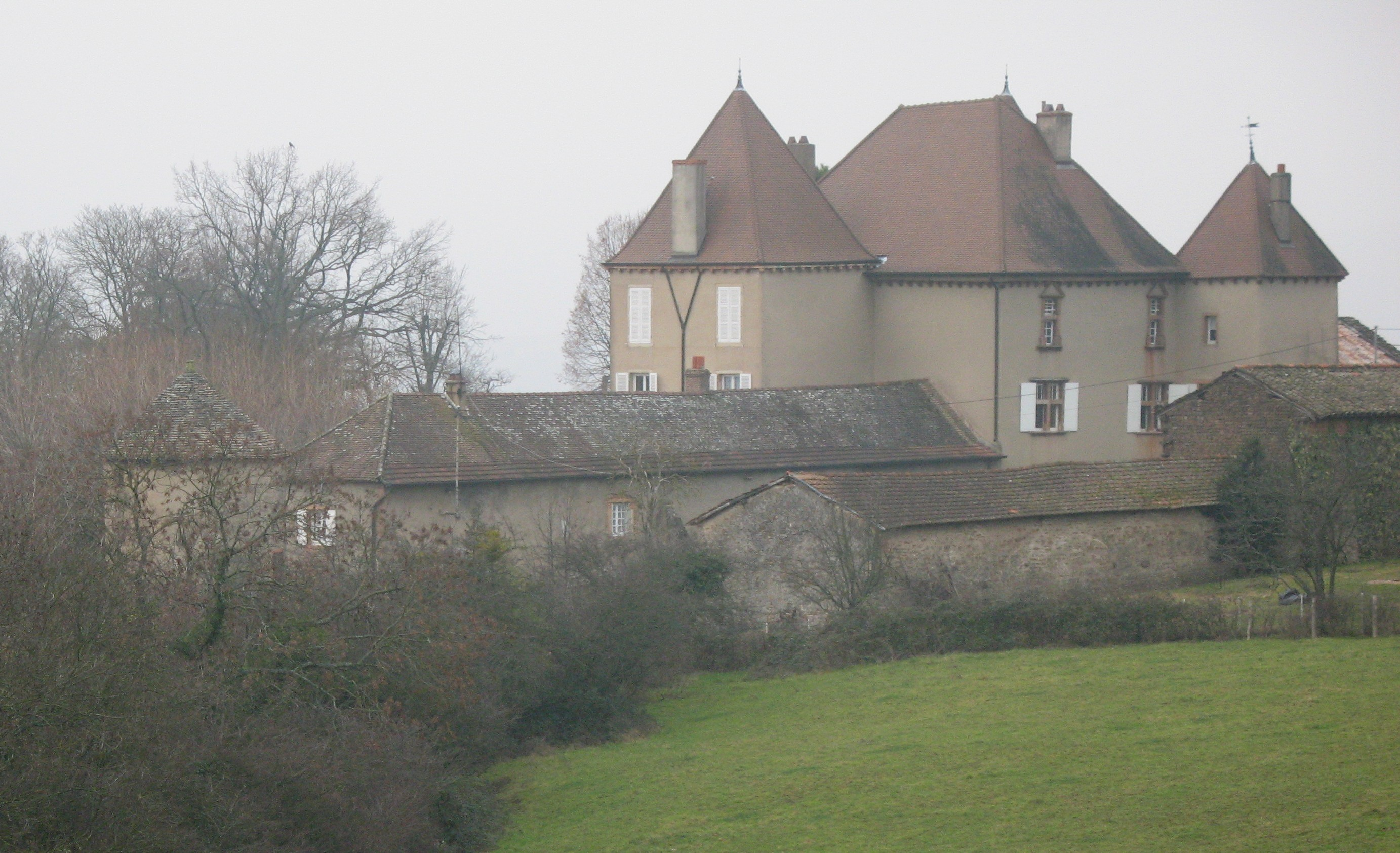 château de Chevagny-les-Chevrières (Saône-et-Loire)